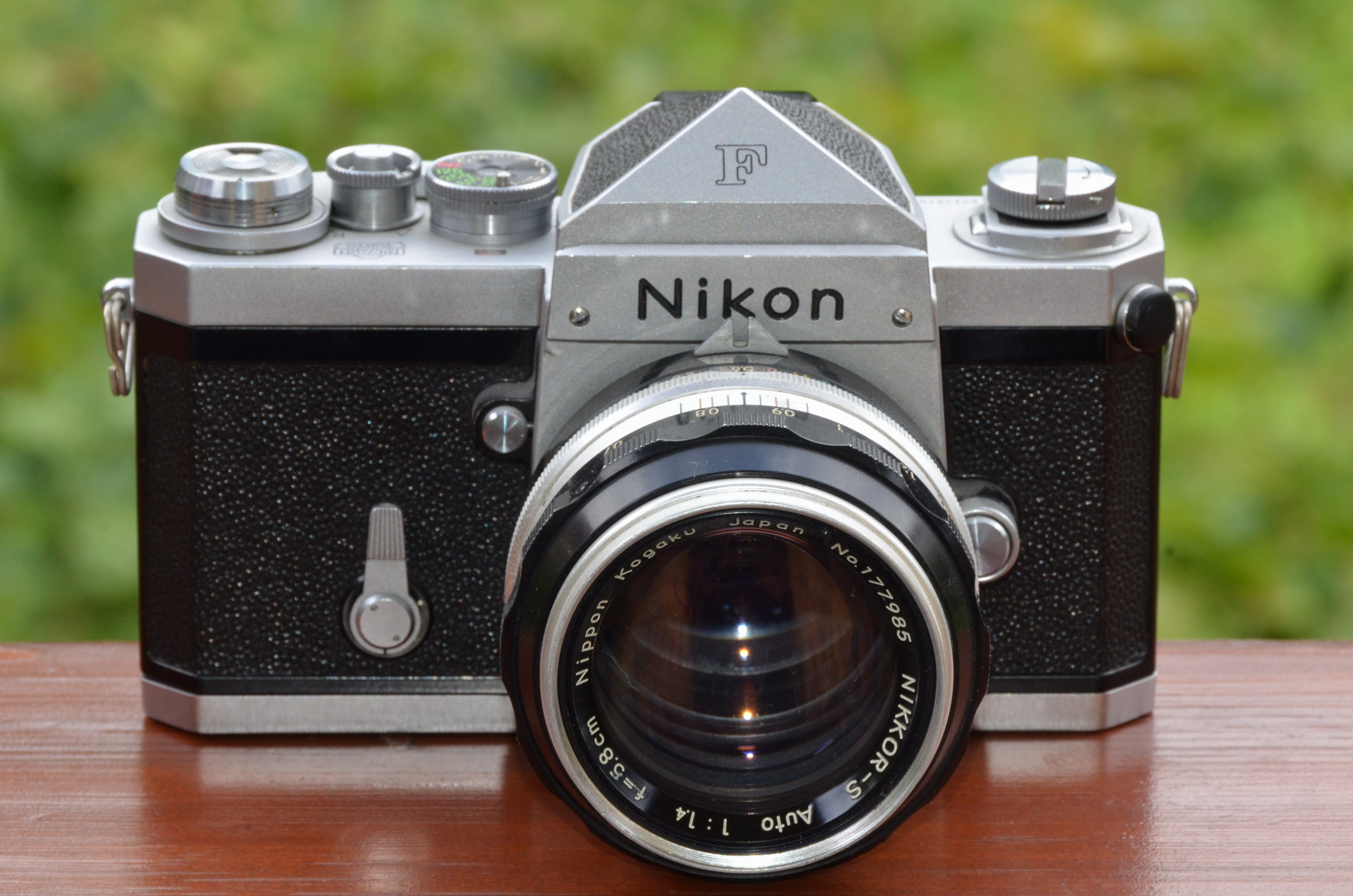 Nikon F professional SLR camera with early NIKKOR-S Auto 1:1,4 f=5,8cm; own work